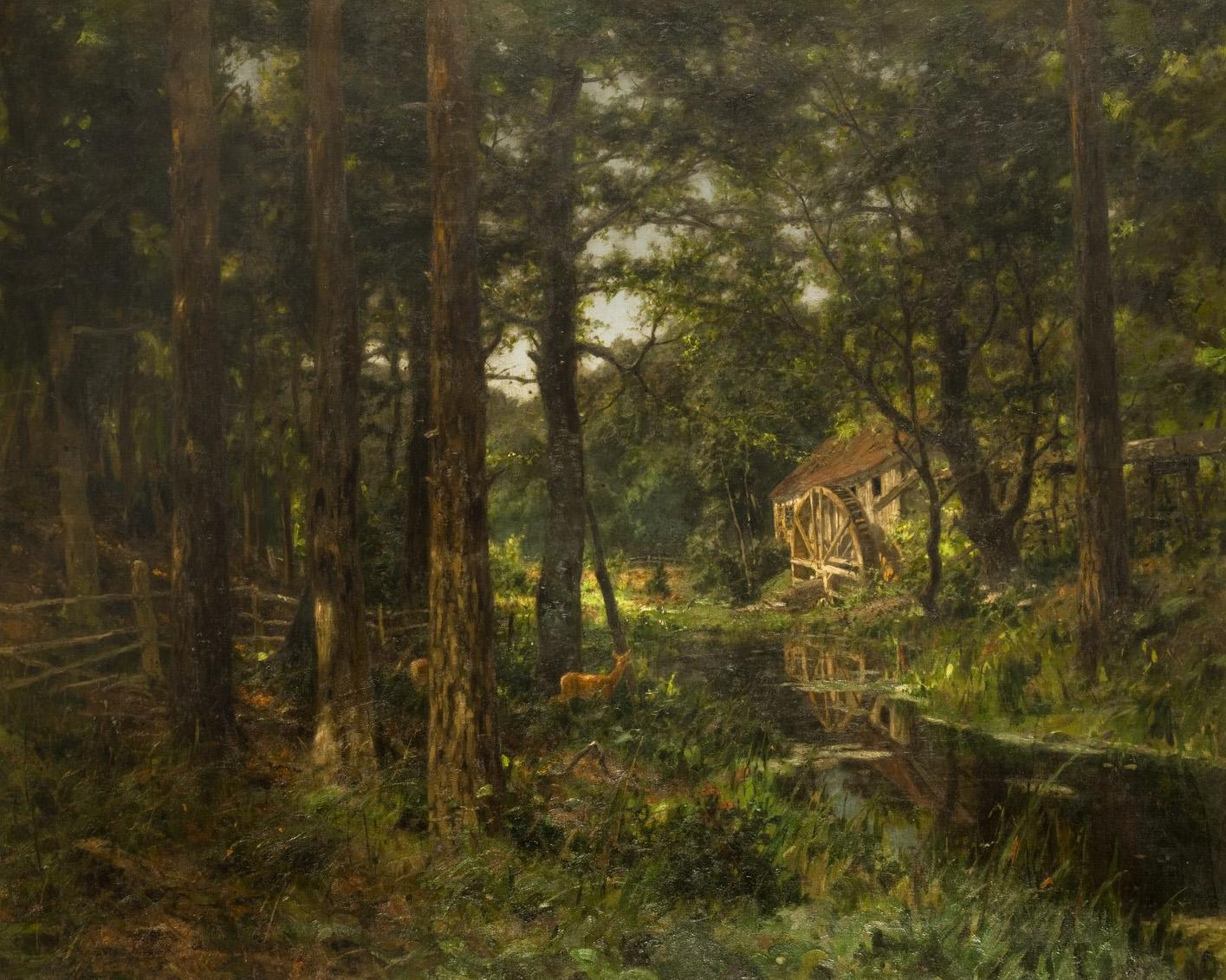 Waldmühle, links unten signiert: Hoenow, Öl/Leinwand, 110 x 137 cm